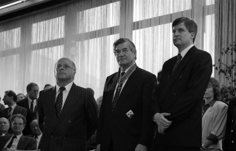 Im Rahmen einer Kabinettsumbildung wurde der CSU-Bundesabgeordnete Horst Seehofer (r.) am 21. April 1989 zum neuen Parlamentarischen Staatssekretär beim Bundesminister für Arbeit und Sozialordnung ernannt. Er wurde Nachfolger des Parlamentarischen Staatssekretärs beim Bundesminister für Arbeit und Sozialordnung, Stefan Höpfinger.